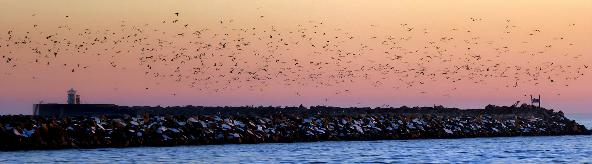 Vid kvällning kan det på vågbrytare samlas tusentals individer. Här är det över västra vågbrytaren i Ystad 14 feb 2017.